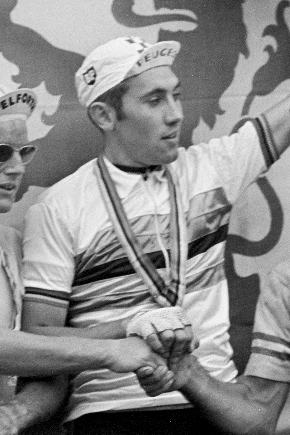 WK Wielrennen te Heerlen finish profs. Nummers 1.2.3 op podium